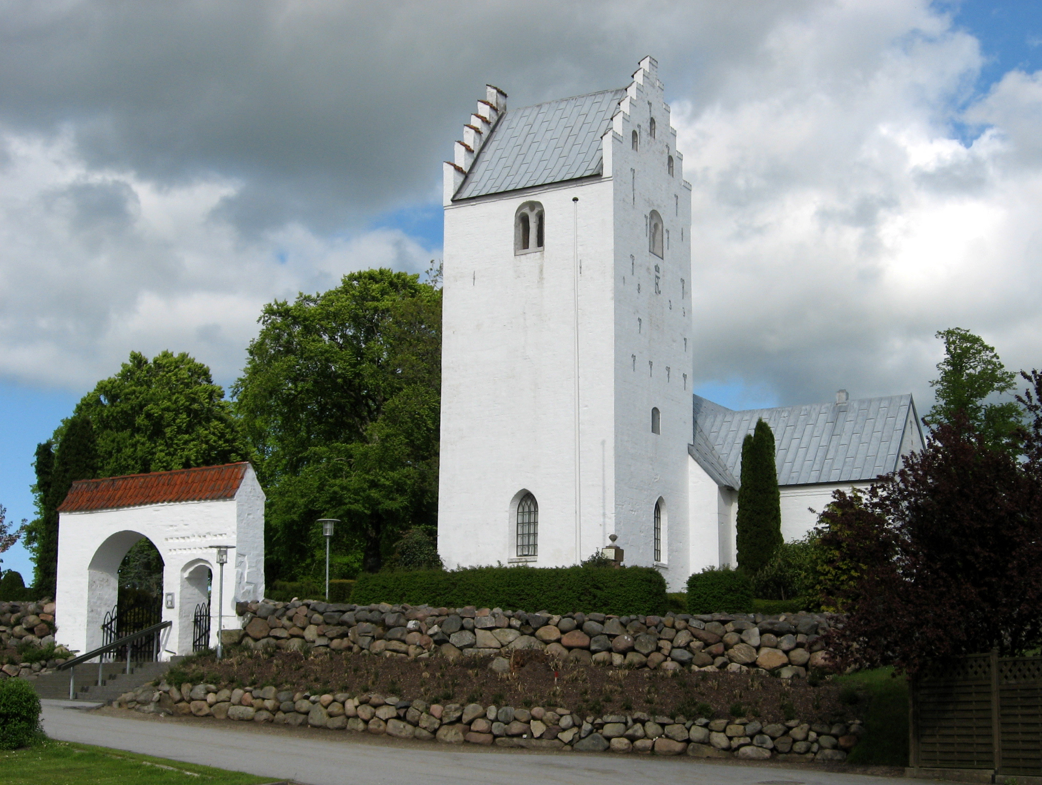 Ørum Kirke in Ørum Sogn in Nørre Djurs Kommune on Djursland, Denmark.